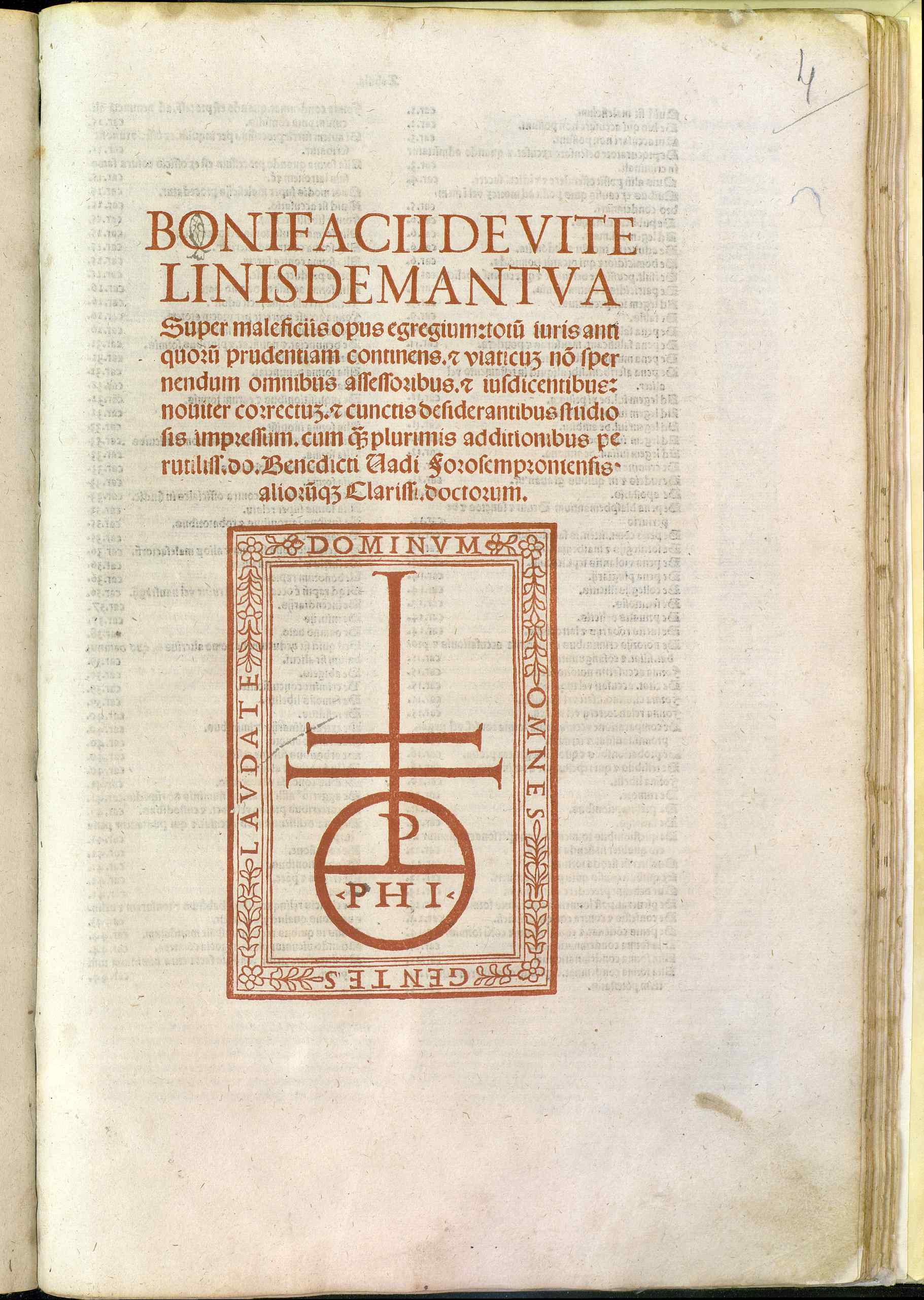 Frontespizio